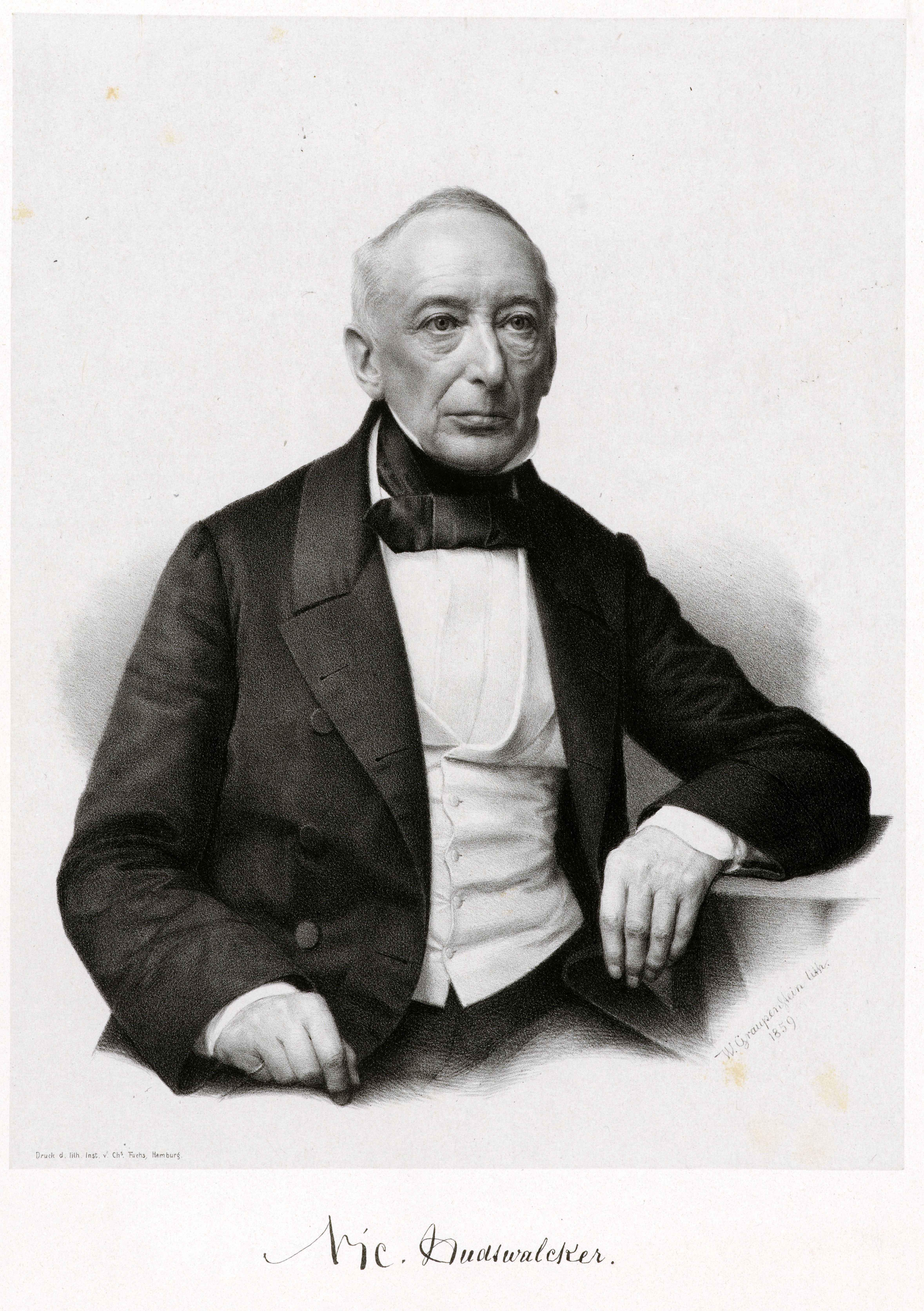 Nic. Hudtwalcker